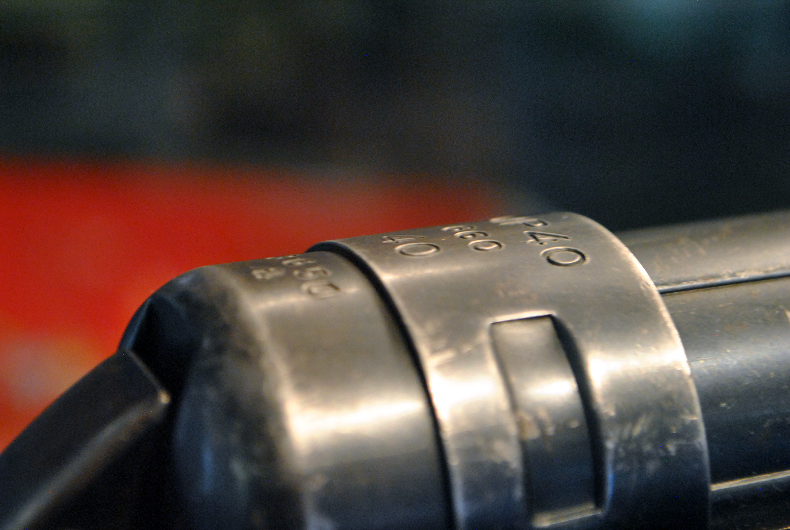 La MP40 (Machinenpistole 40) fue un subfusil creado y usado extensivamente por los alemanes durante la Segunda Guerra Mundial. Close up de un subfusil en el Museo de la Armada, París, Francia.